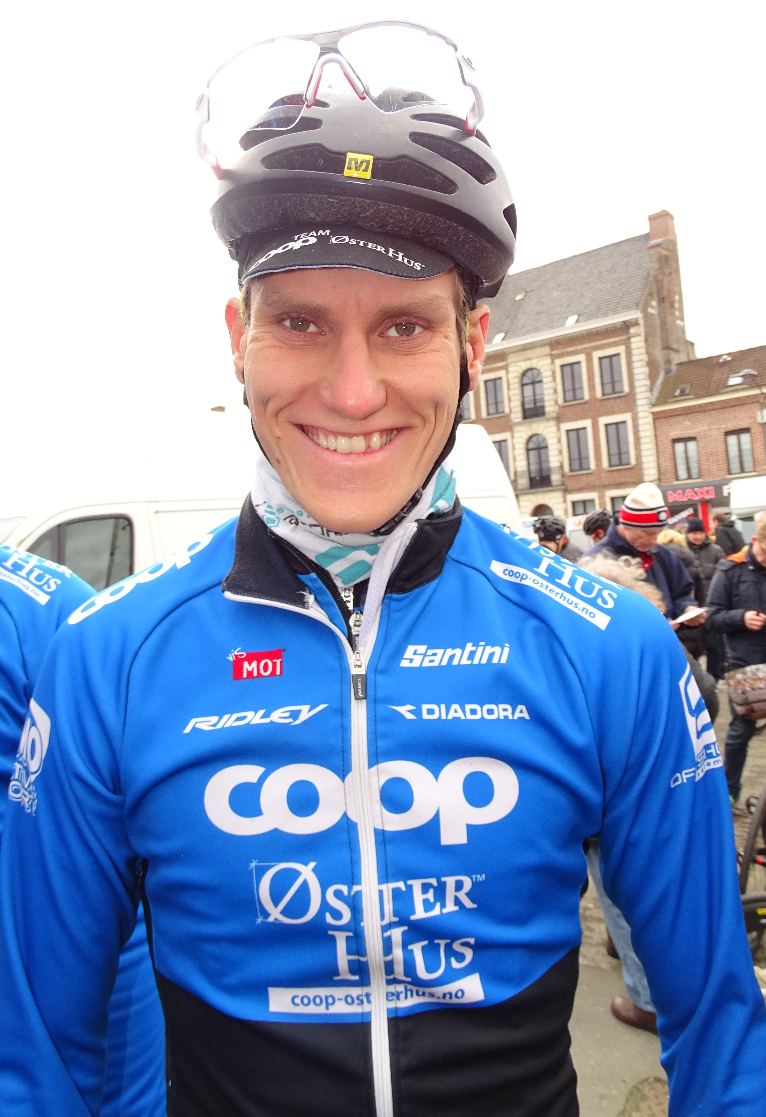 Reportage réalisé le dimanche 6 mars à l'occasion du départ et de l'arrivée du Grand Prix de Lillers-Souvenir Bruno Comini 2016 à Lillers, Pas-de-Calais, Nord-Pas-de-Calais, France.